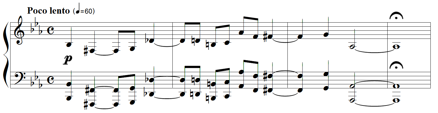 Louis Vierne (1870-1937) Quintette, op.42 - premières mesures au piano